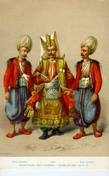 Janjičari.[1] Janissaries